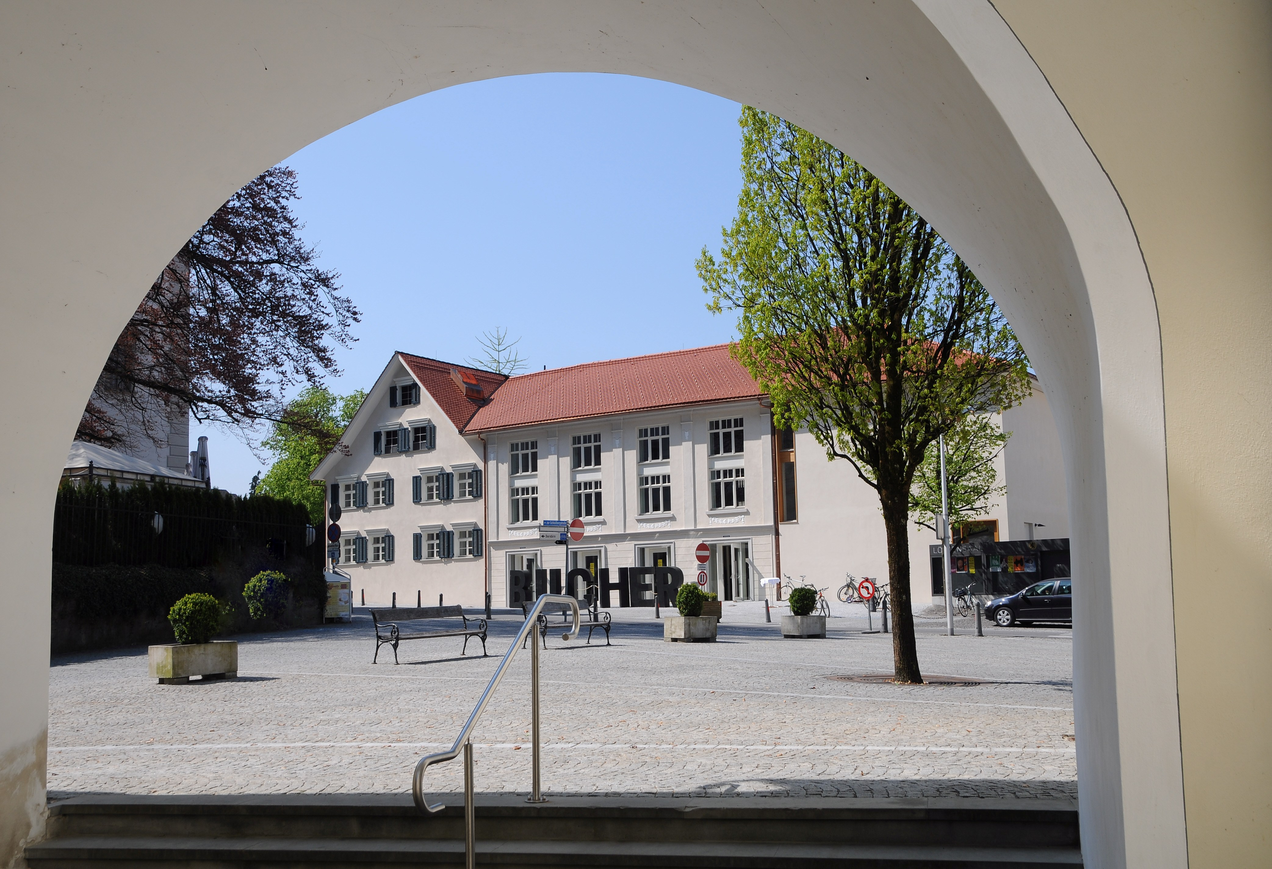 Schloßplatz Nr.:9 in Hohenems; aus dem DEHIO Vorarlberg 1983: Gasthaus, 2geschossig; Zwerchgiebel zum Platz, Rundbogenportal (A.19.Jh?). 3geschossiger Anbau, Pilastergliederung, Festonschmuck mit sezessionistischem Einfluß. 2011 generalsaniert.